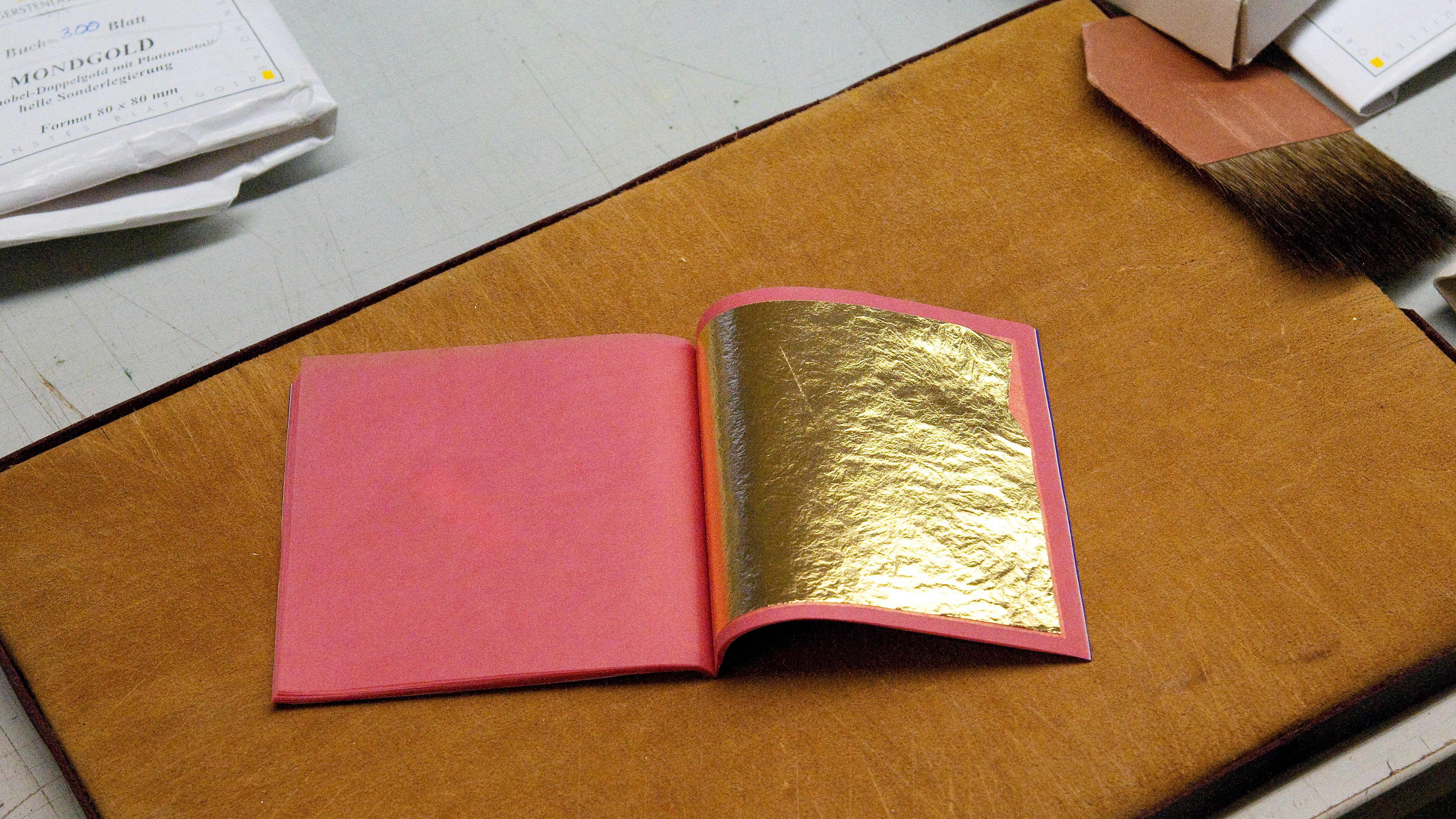 Goldblatt 80 x 80 mm in einem handelsüblichen Heft („Rosenobel-Doppelgold mit Platinmetall, helle Sonderlegierung“ der Marke „Mondgold“ von der Firma Gerstäcker), hier auf einer dem Zuschneiden dienenden Lederfläche. Oben rechts ein Anschießer (Haarpinsel), der zum Auftragen des zugeschnittenen Blattgolds beim Vergolden dient.